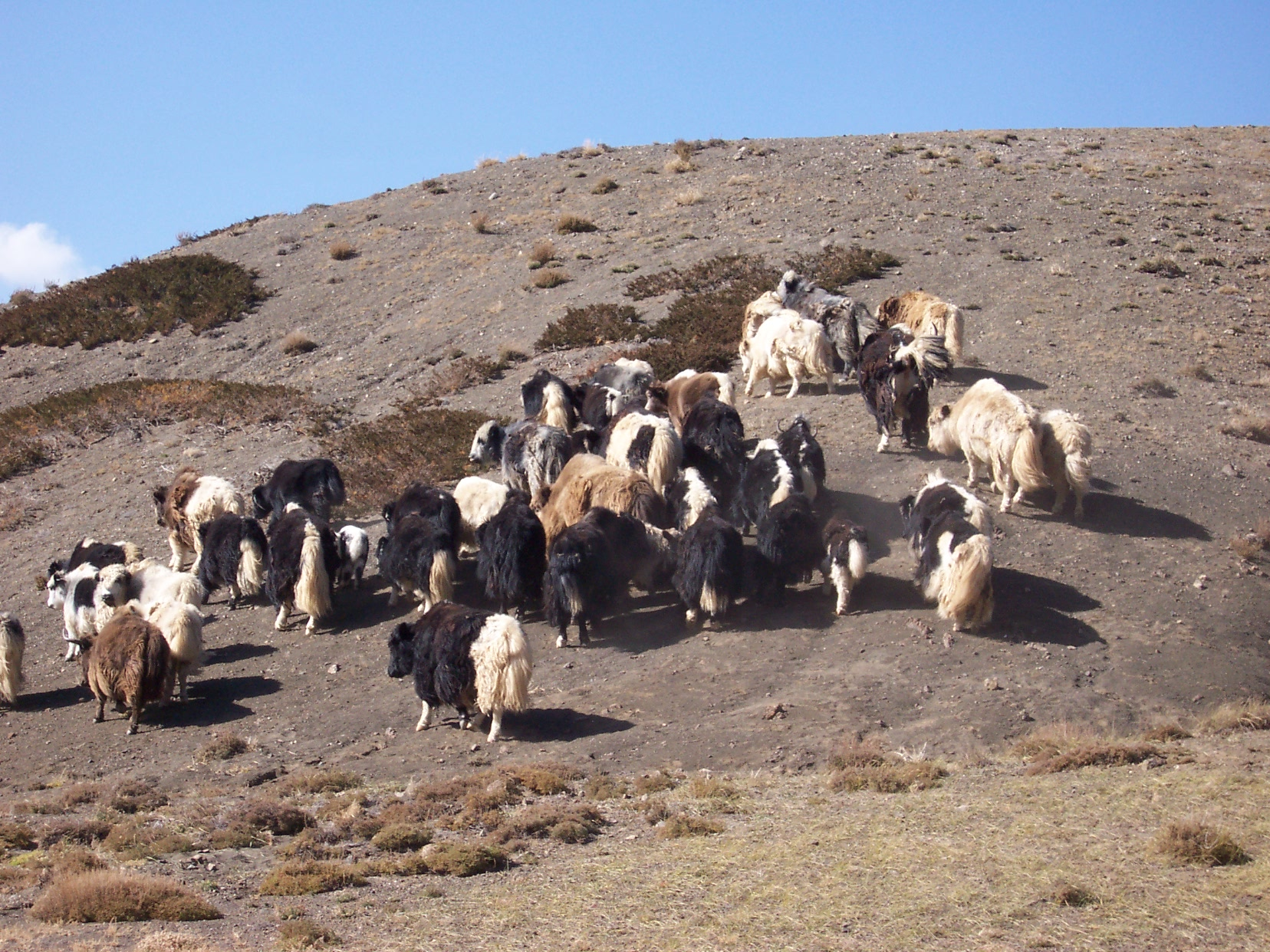 Des yacks dans le désert de Gobi.